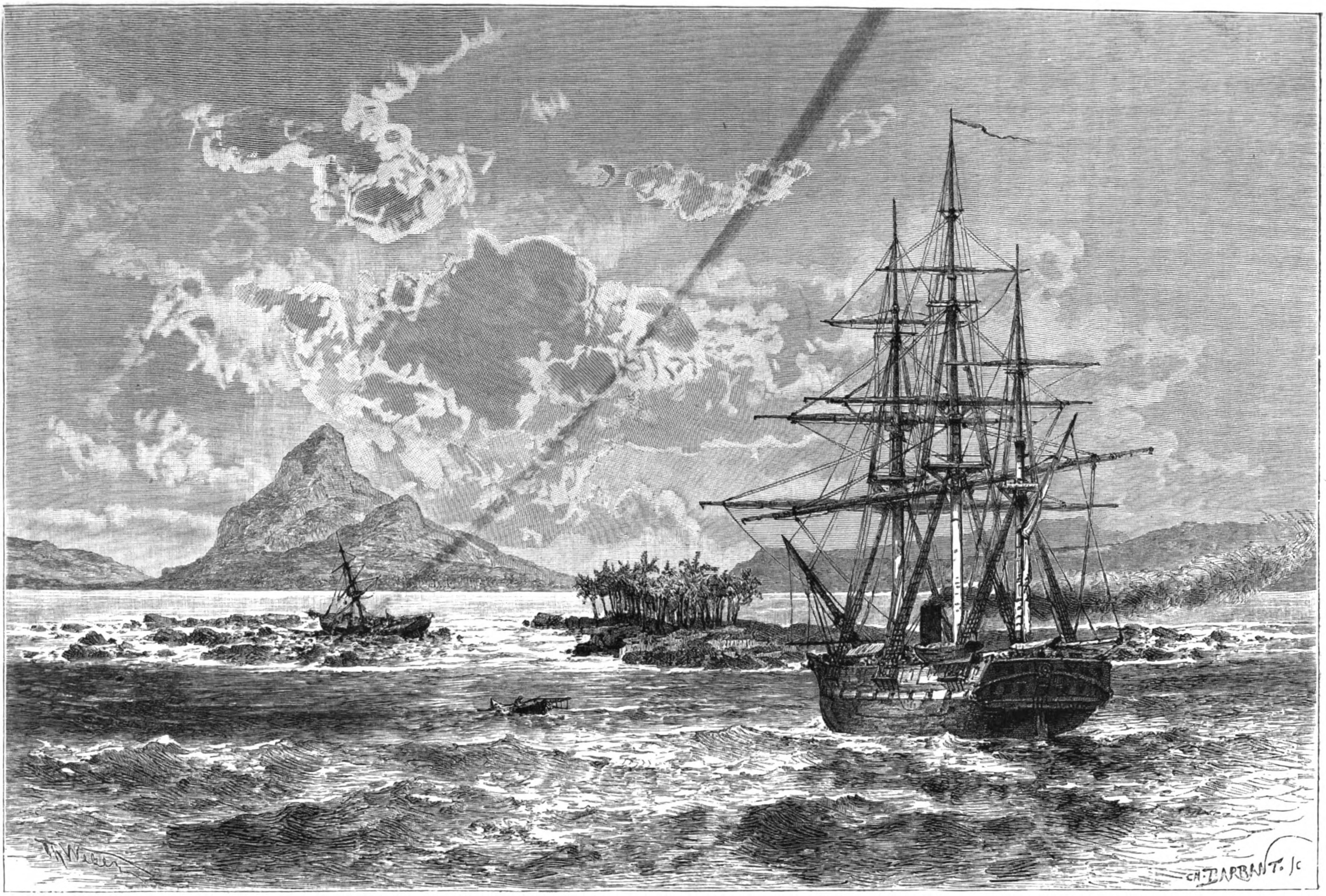 Le navire français l'Orne devant la passe de Honikulu, à Wallis (Pacifique Sud) en 1874 (selon Angleviel 1994) ou 1875 (Rossile 1986). Sur la gauche se trouve l'épave du navire l'Hermitte, qui a fait naufrage en heurtant les récifs. Gravure réalisée à partir d'un croquis d'E. Deschamps